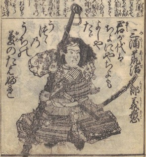 三浦義意